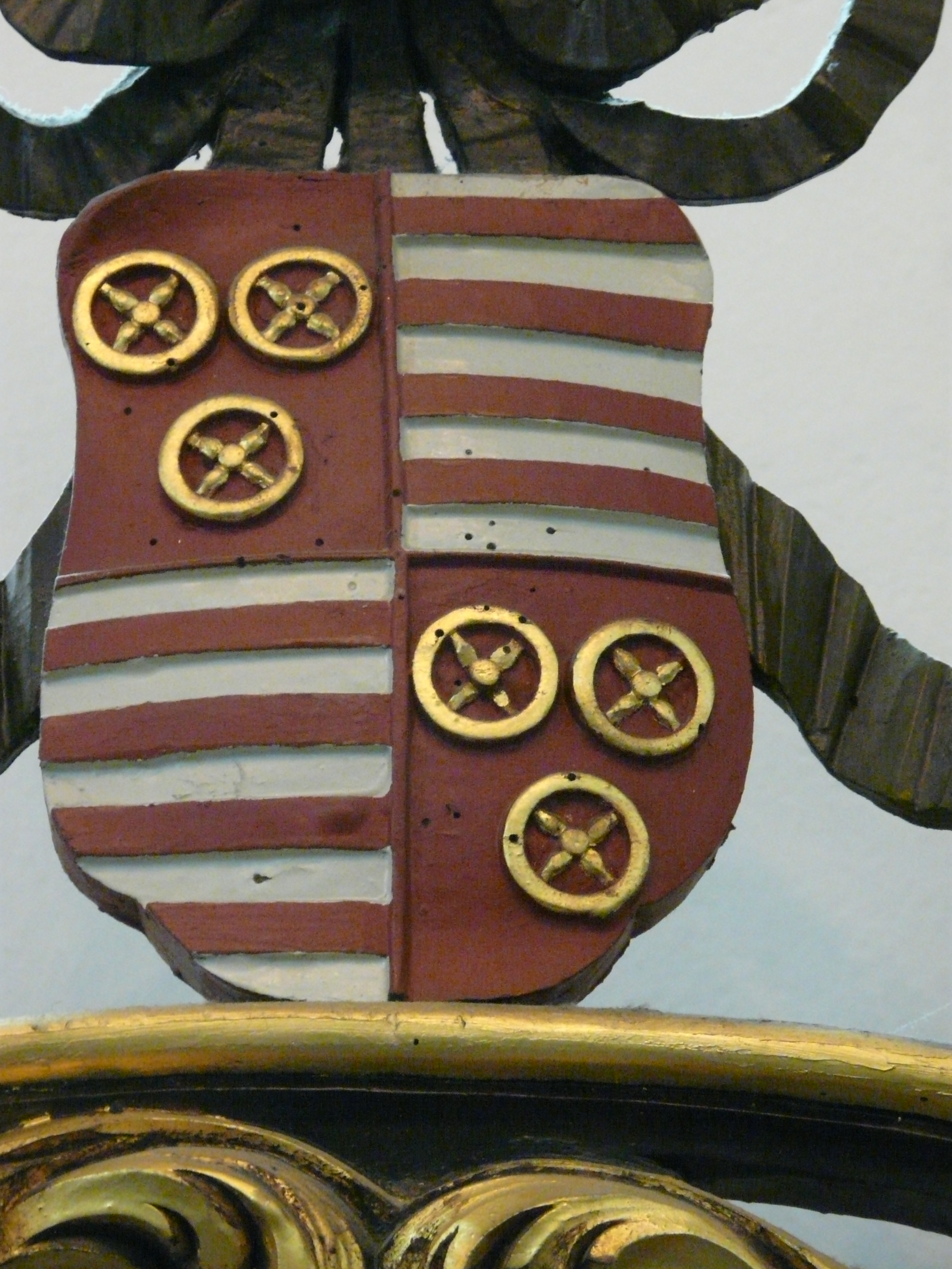 coats of arms of the former chapter of the Dom-cathedral in Utrecht (NL)